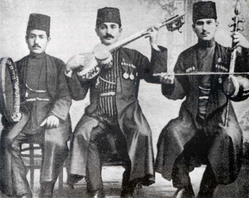 İslam Abdullayev, Şirin Axundov, Levon Qaraxanov